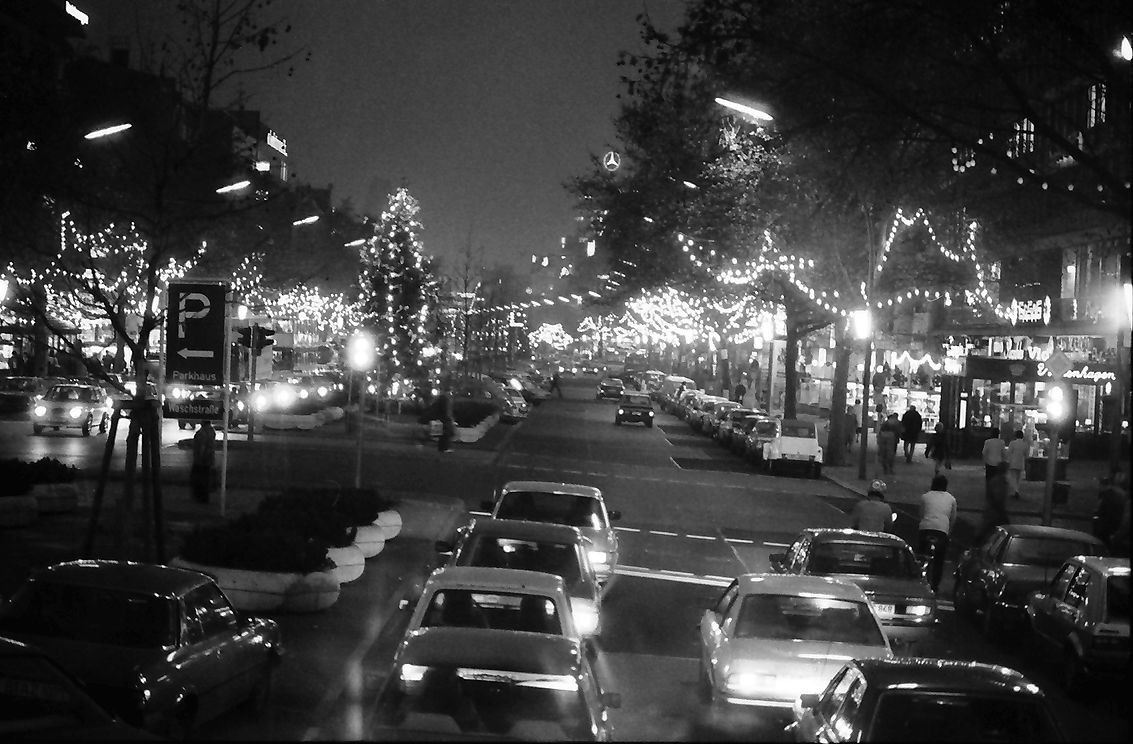 Kurfürstendamm in Berlin.